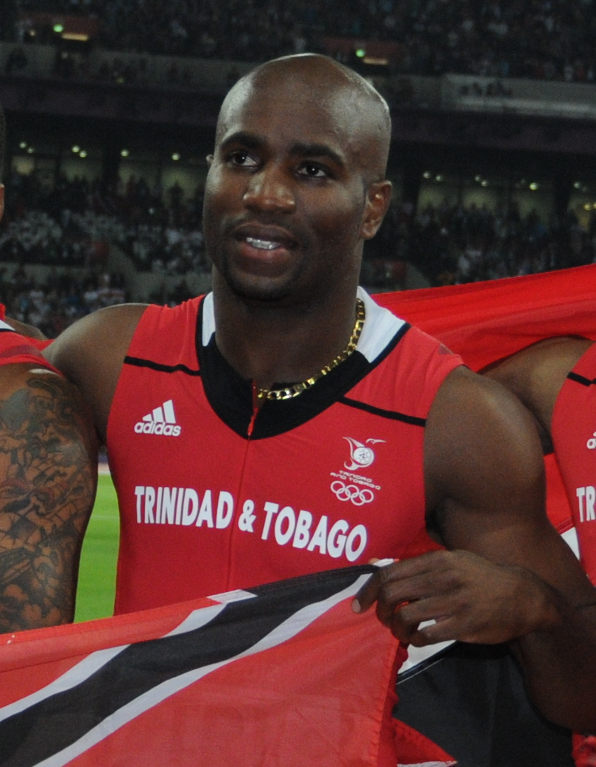 Equipe du relais 4x100 de Trinité-Tobago